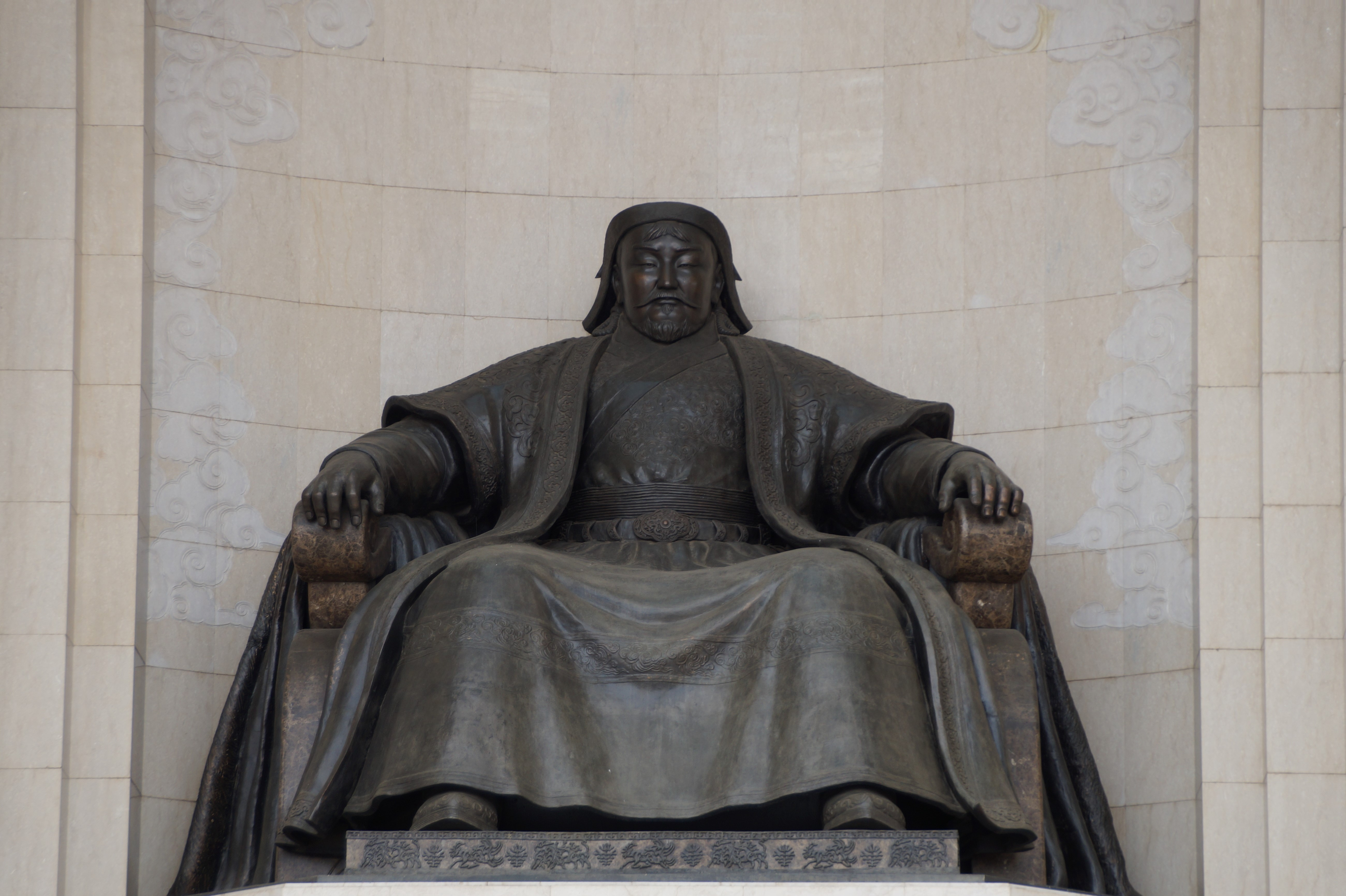 Mongolia - Genghis Khan